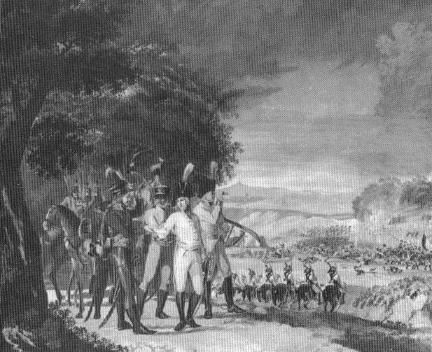 L'archiduc Charles et son état-major à la bataille d'Ostrach, 1799.